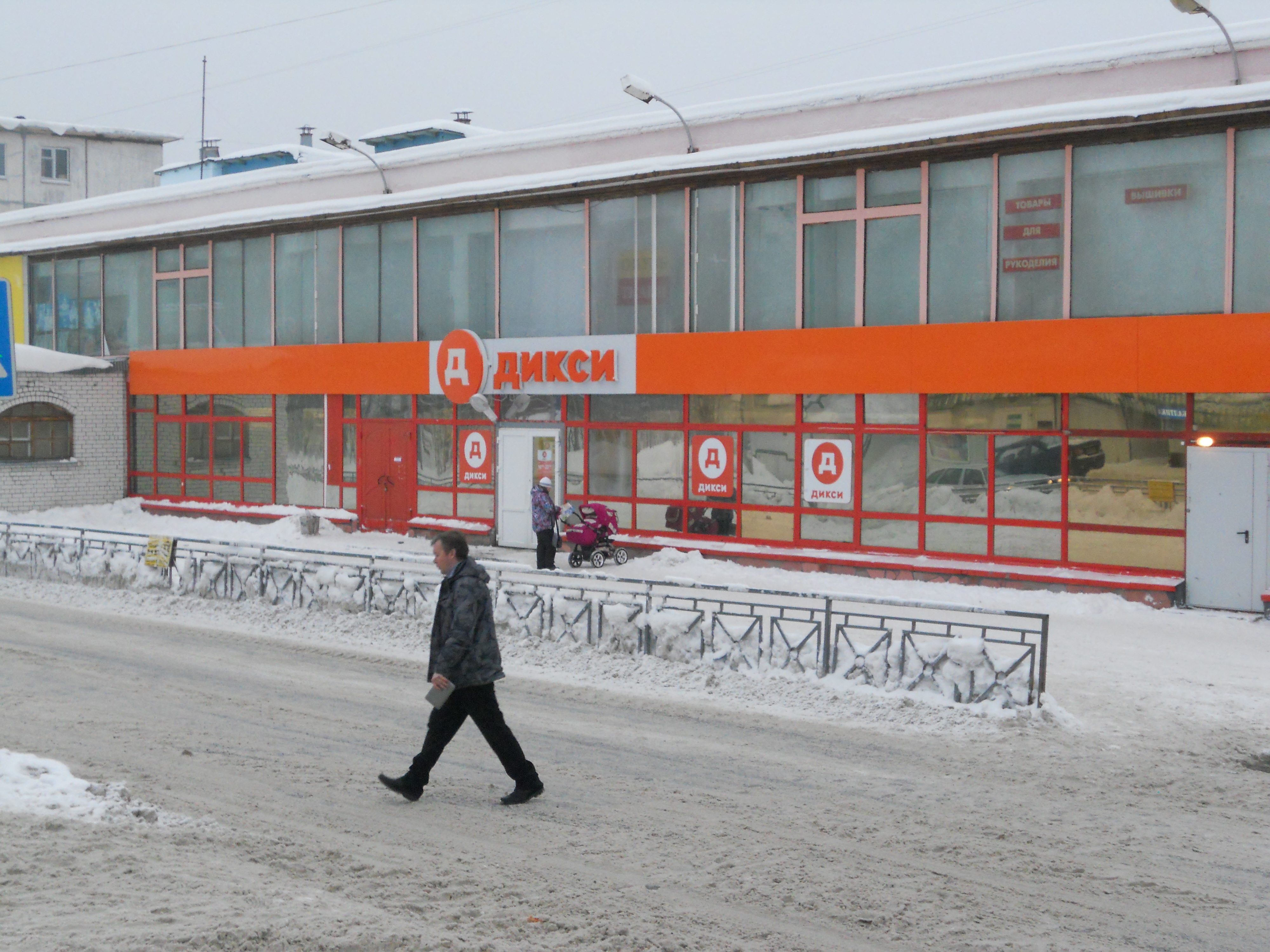 Ул Фестивальная 01